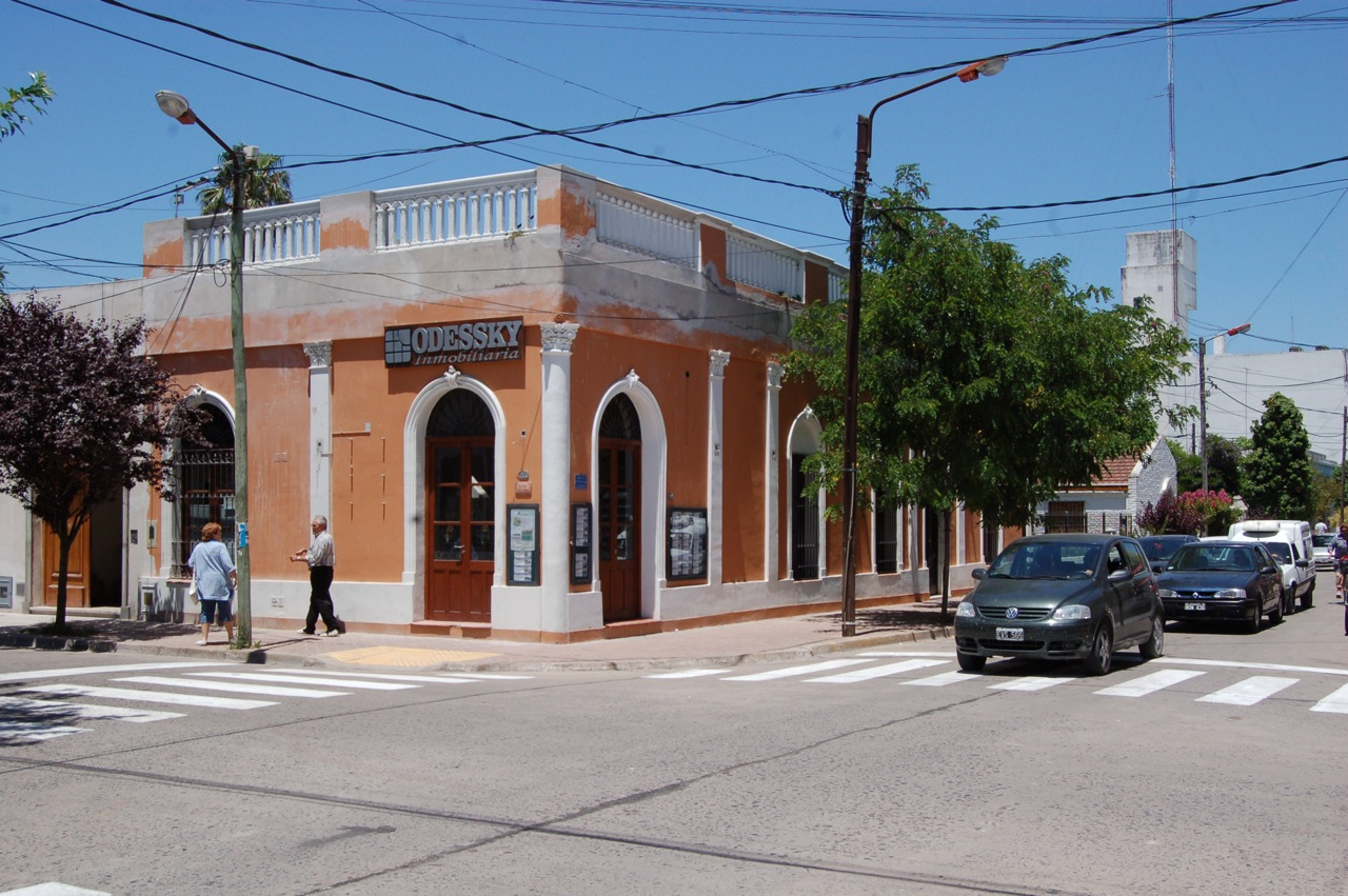 Typical street corner in Cañuelas, Buenos Aires Province, Argentina.